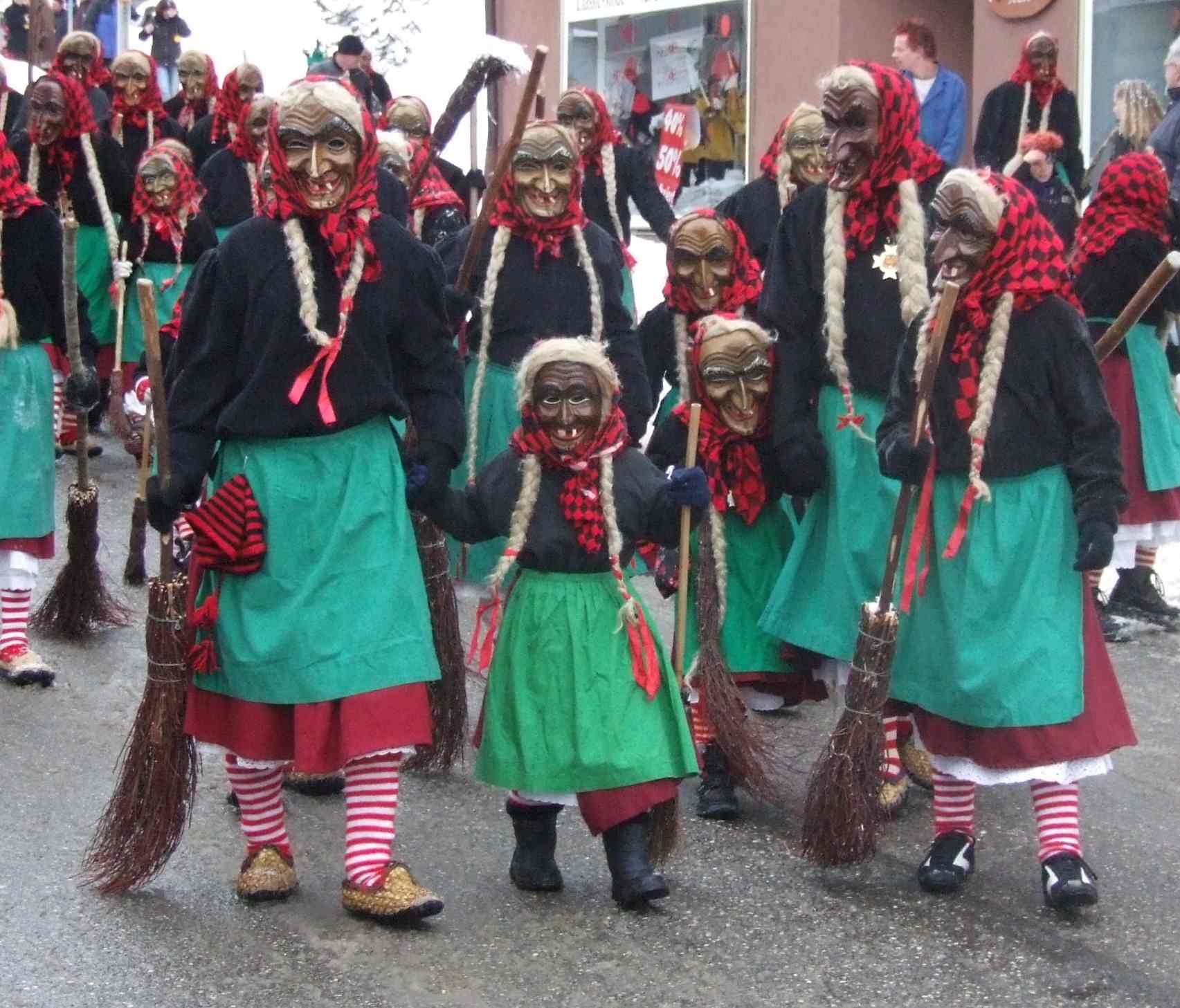 Hexen der Narrenzunft Furtwangen, 2006